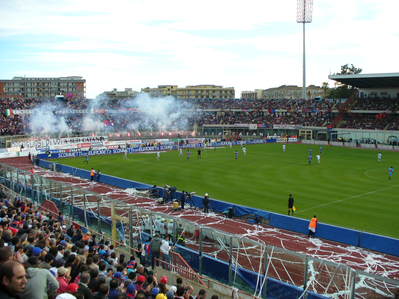 Estádio Angelo Massimino. Partida pela série A do campeonato italiano. O Catania chegou a estar perdendo por 2 x 1. Virou a partirda com um gol do ultimo minuto! O unico jogador brasileiro em campo foi Cesar Prates, atuando pelo Livorno. Ele entrou no segundo tempo, jogou por 20 minutos e depois foi substituido.